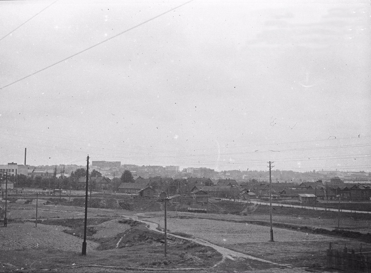 Беларуская (тарашкевіца): Менск (Miensk), Араны (Arany)